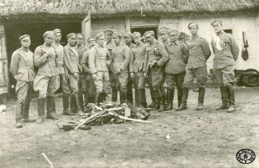 Żołnierze z 2 Pułku Ułanów Legionów Polskich stoją przed porzuconą bronią po odmowie złożenia przysięgi. Na zdjęciu widoczny m.in. por. Antoni Jabłoński „Zdzisław” (siódmy od lewej).